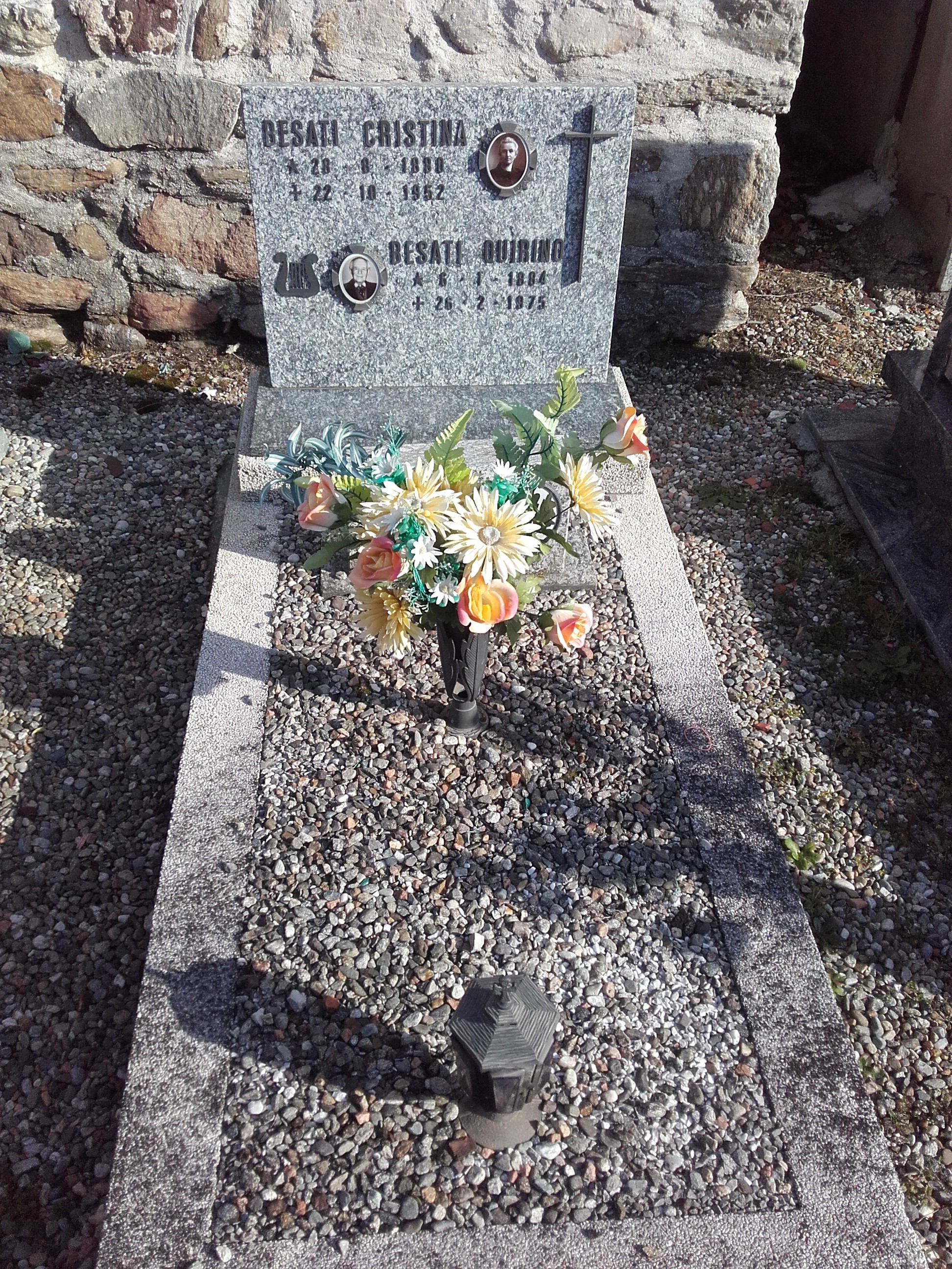 Tomba di Quirino Besati nel Cimitero di Grantola